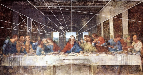 Posledni večeře